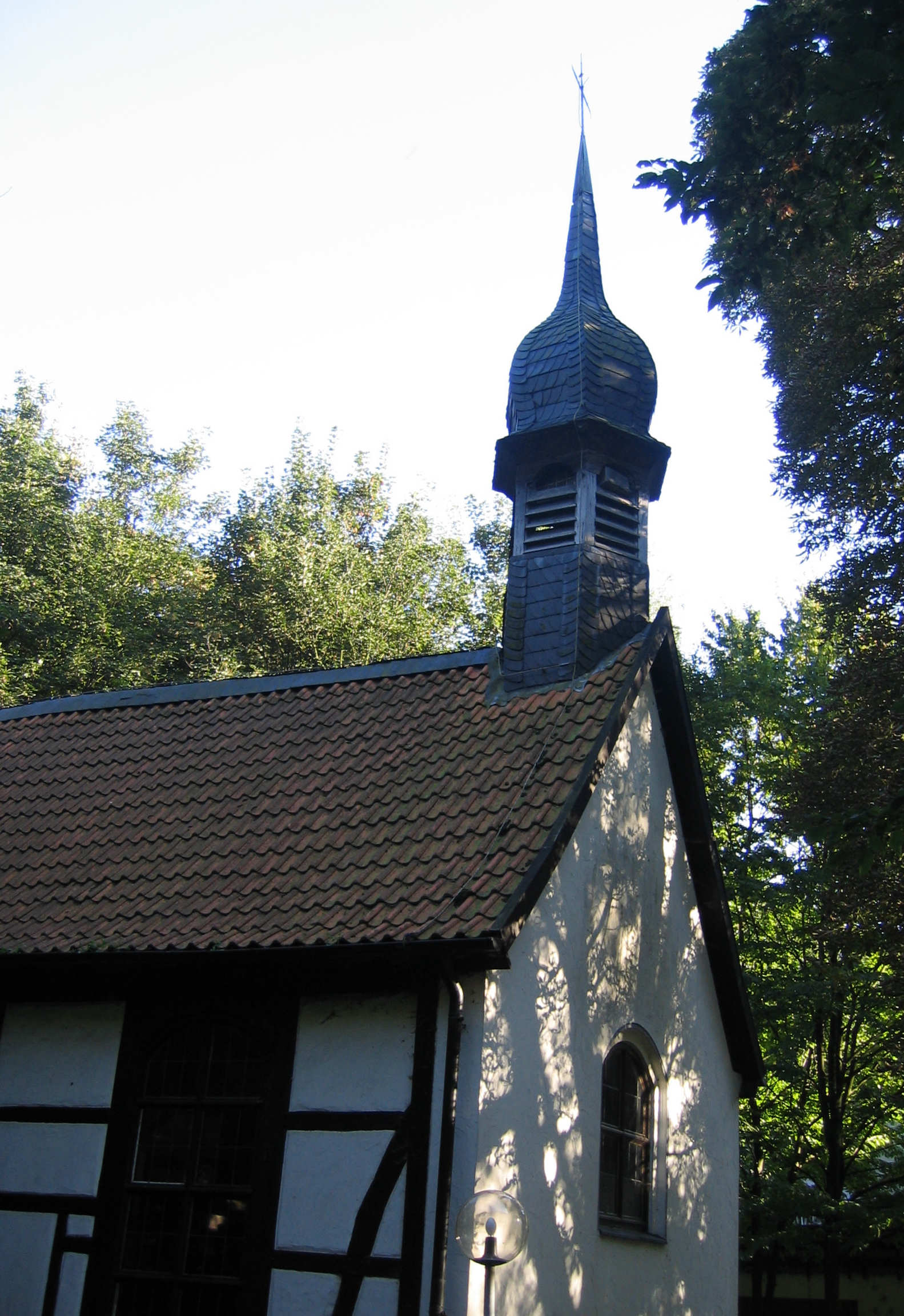 Kapelle Dortmund Wischlingen Eigene Aufnahme September 2006